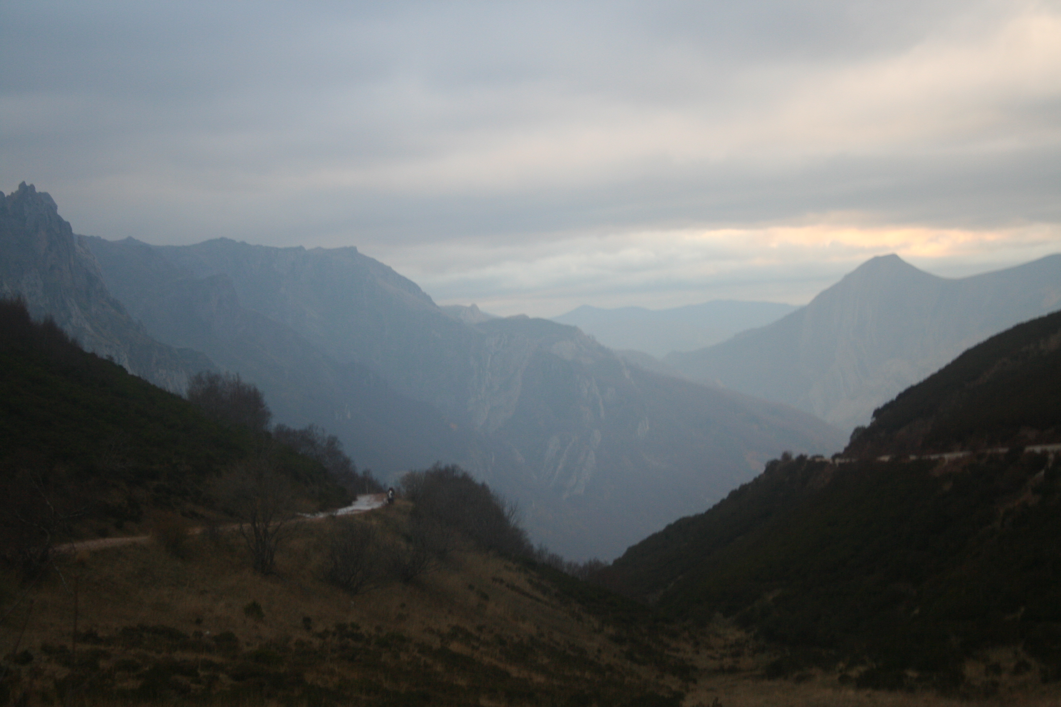 Vista del Parque Natural de Somiedo desde el inico de la senda a los lagos de Somiedo